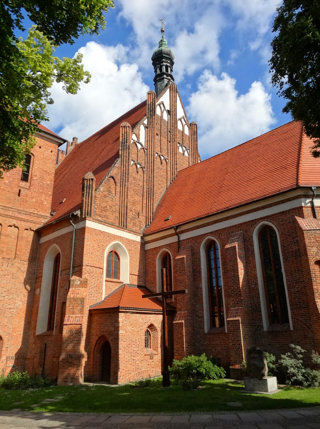 Katedra p.w. św. Marcina i Mikołaja w Bydgoszczy (XIV-XV wiek)